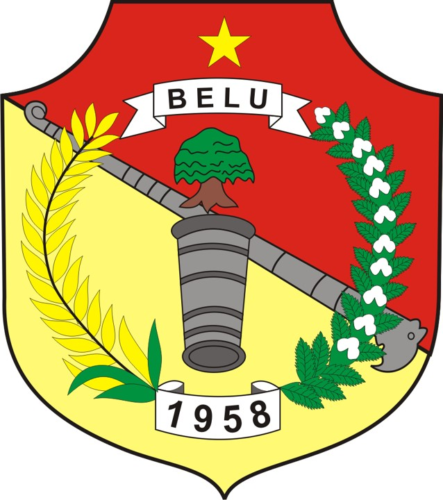 Diperoleh dari situs Departemen Dalam Negeri Republik Indonesia